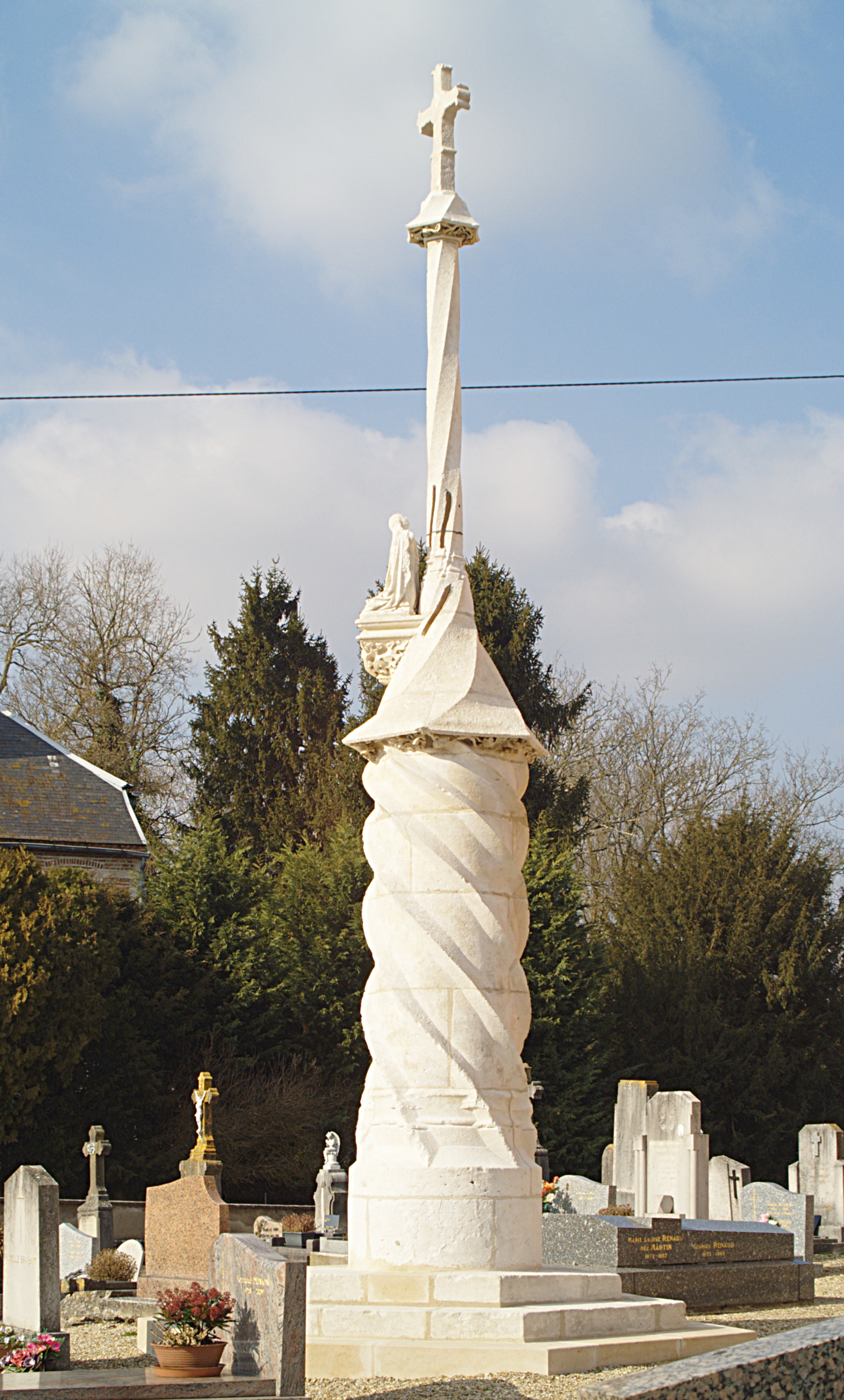 Croix de cimetière, Pagny-la-Ville (Côte d'Or, Bourgogne, France)